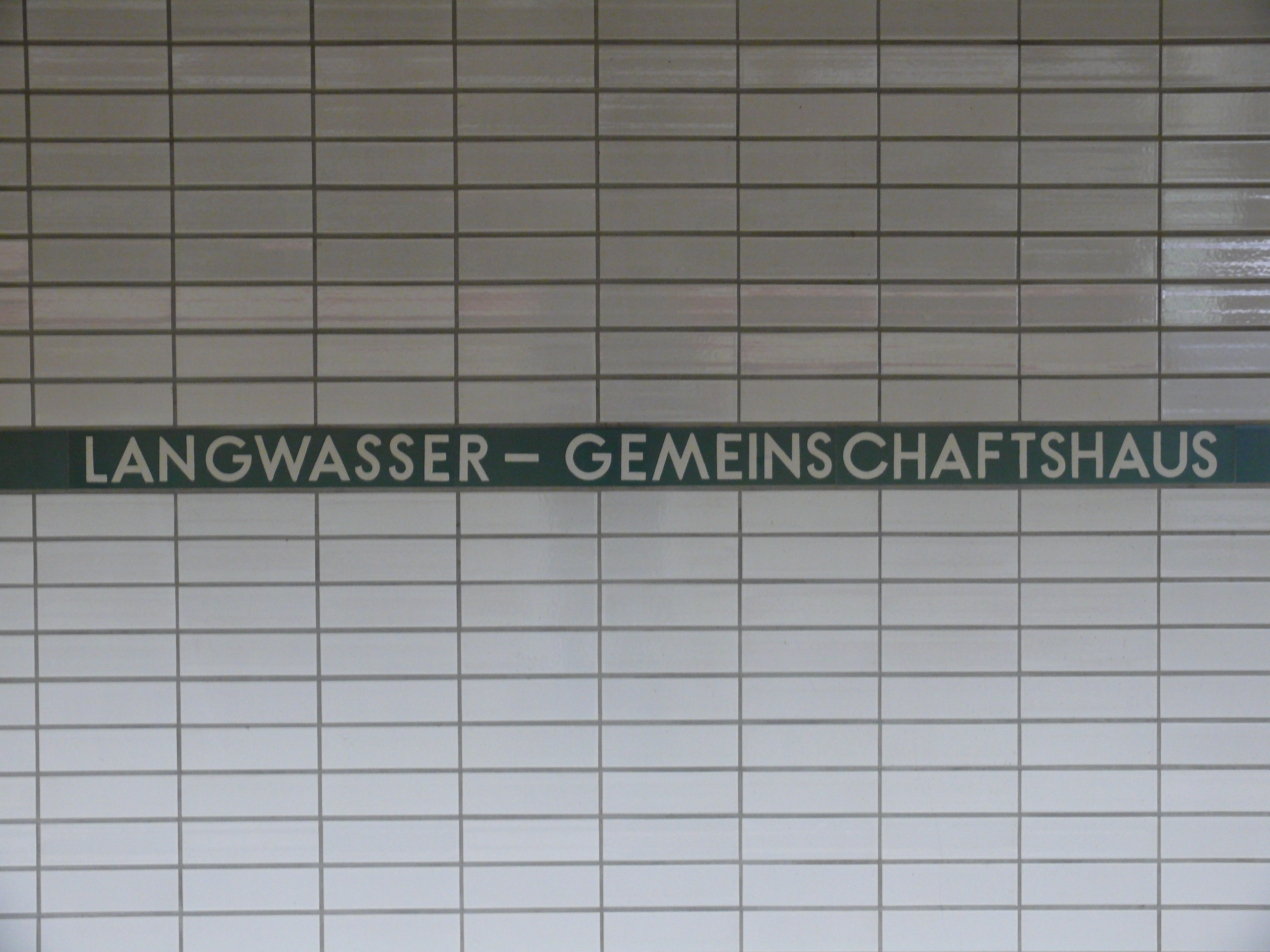 Stationsname an den Bahnsteigwänden am U-Bahnhof Gemeinschaftshaus in Nürnberg.